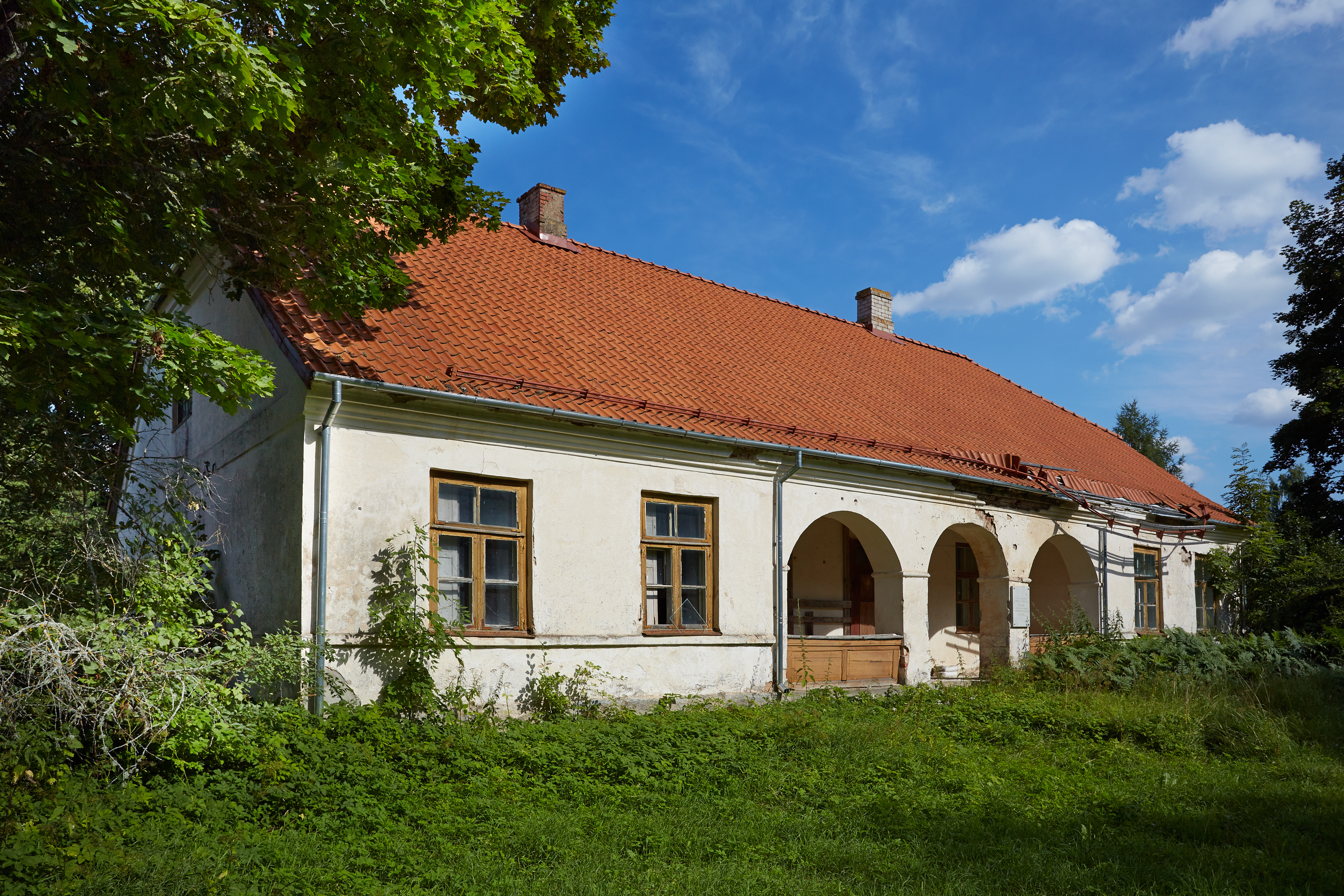 Sänna postijaam 2013. aasta augustis.